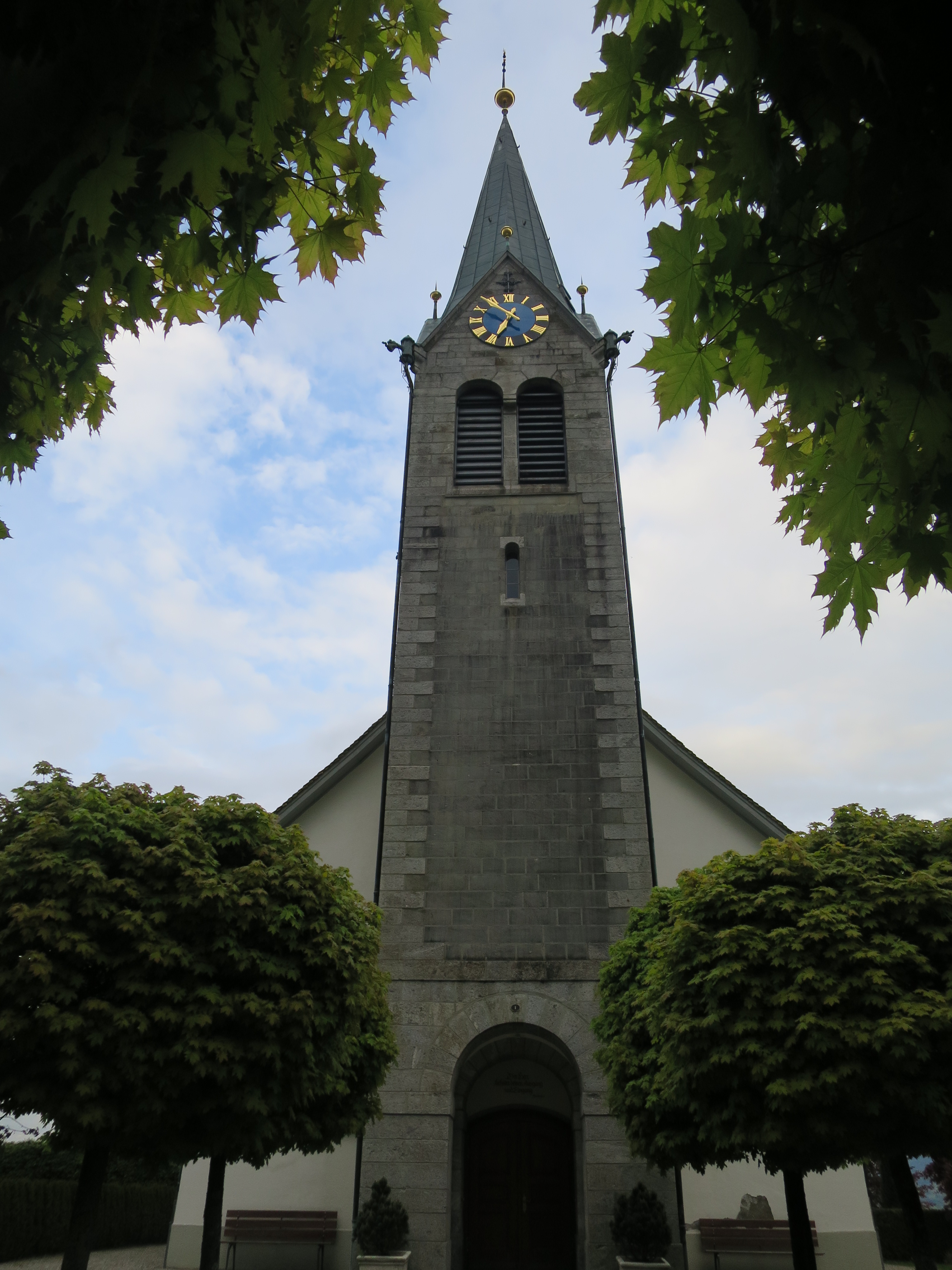 Ref. Kirche Schönenberg